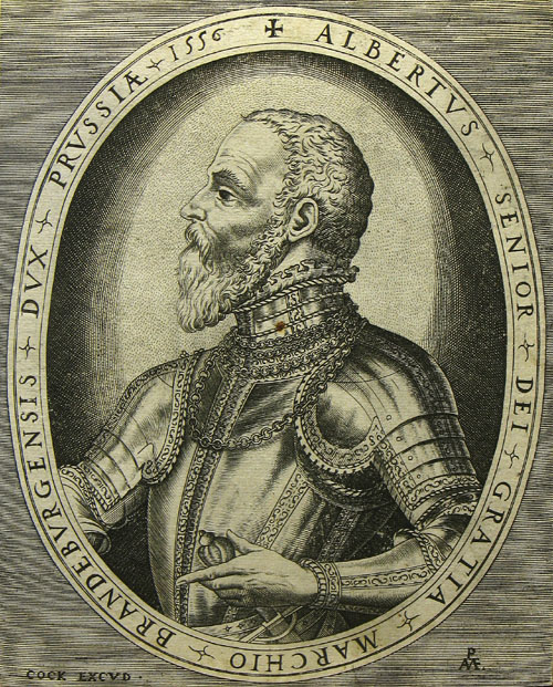 Portrait von Albrecht von Preußen (1490–1568).